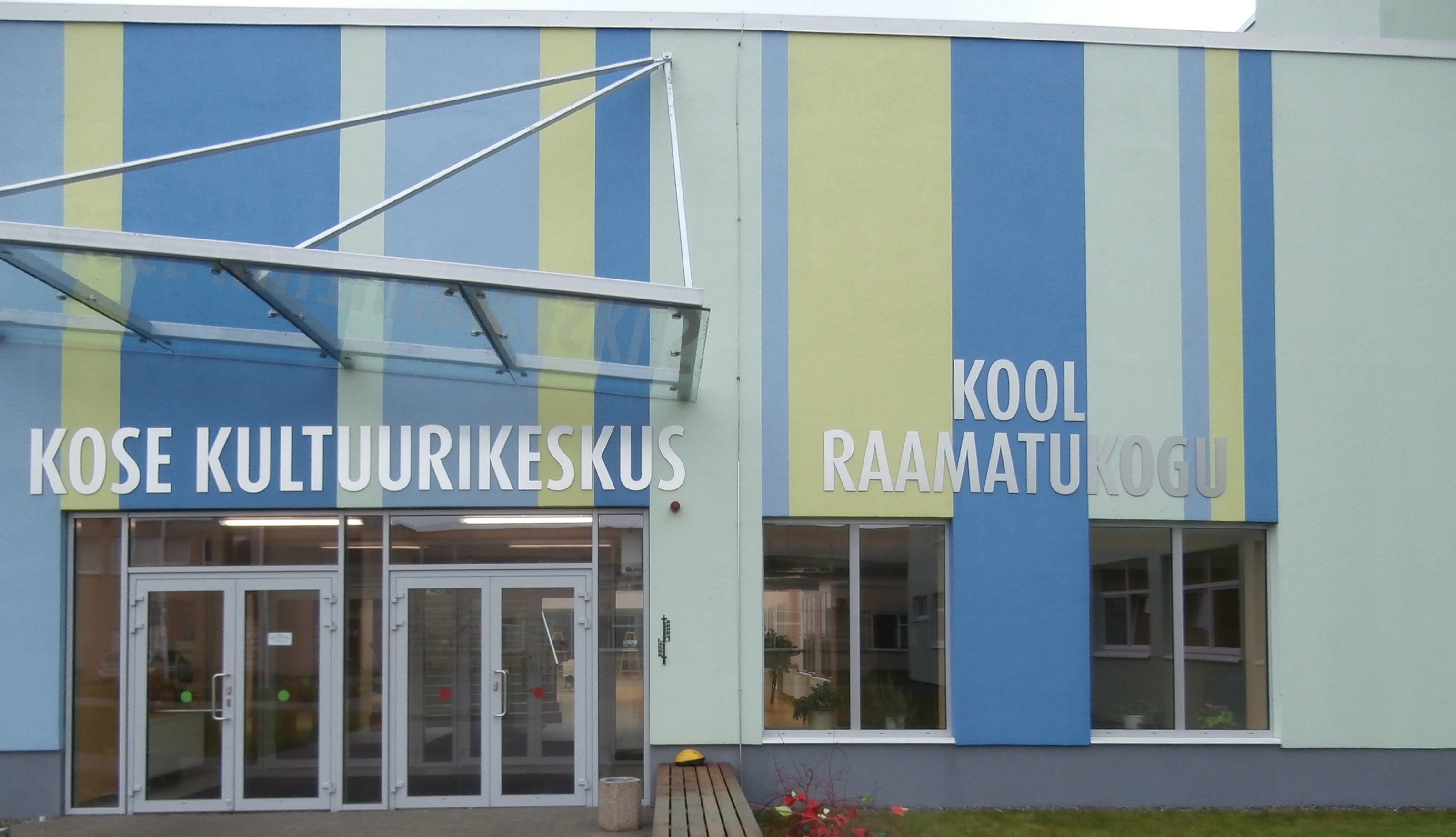 Kose Kultuurikeskuse sissepääs.